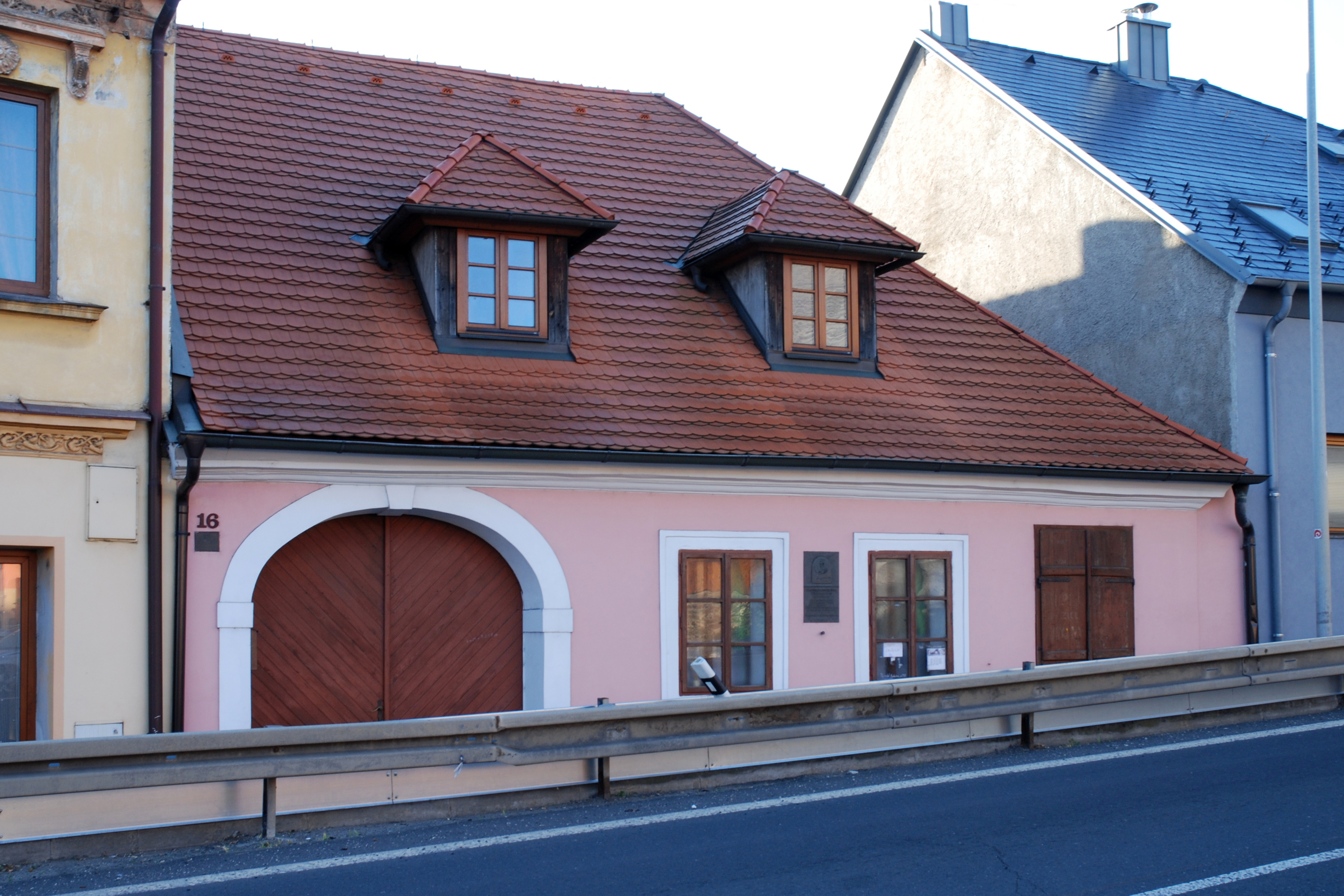 Rodný dům Josefa Hlávky v Přešticích